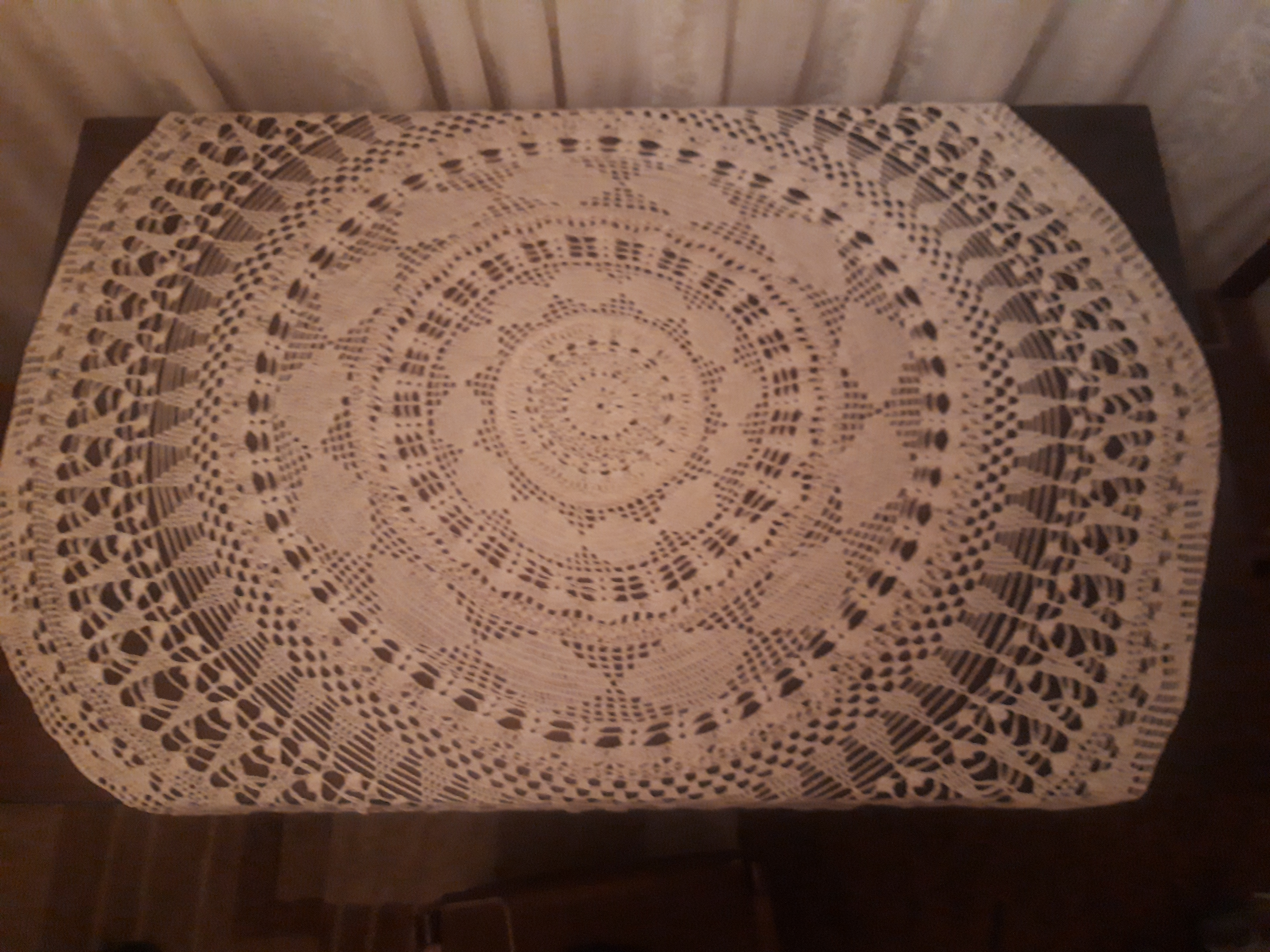 Մետաքսից գործած սփռոց